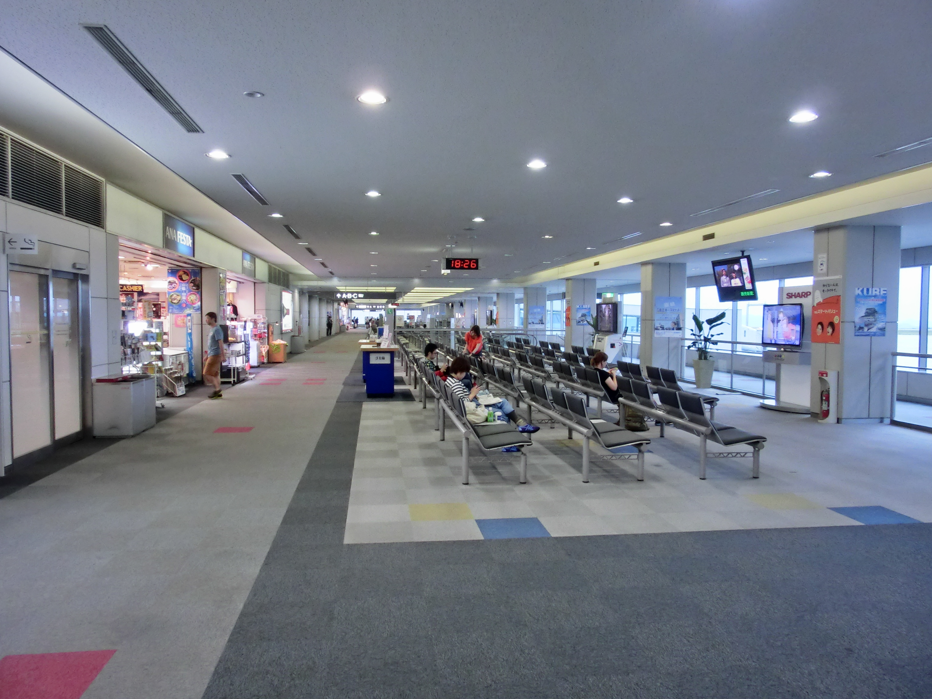 広島空港出発ロビー(ゲート内制限エリア)